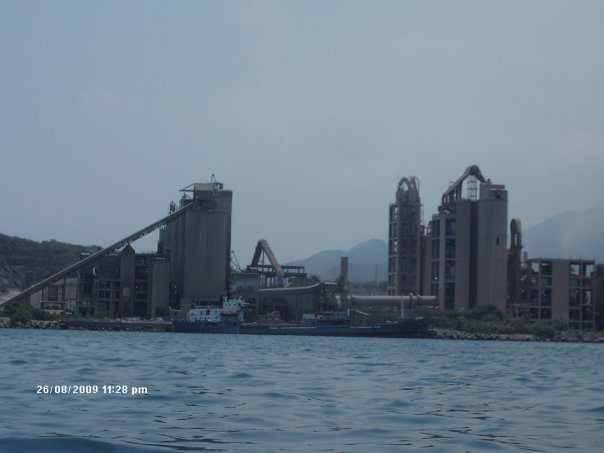 Guanta, estado Anzoátegui - Venezuela